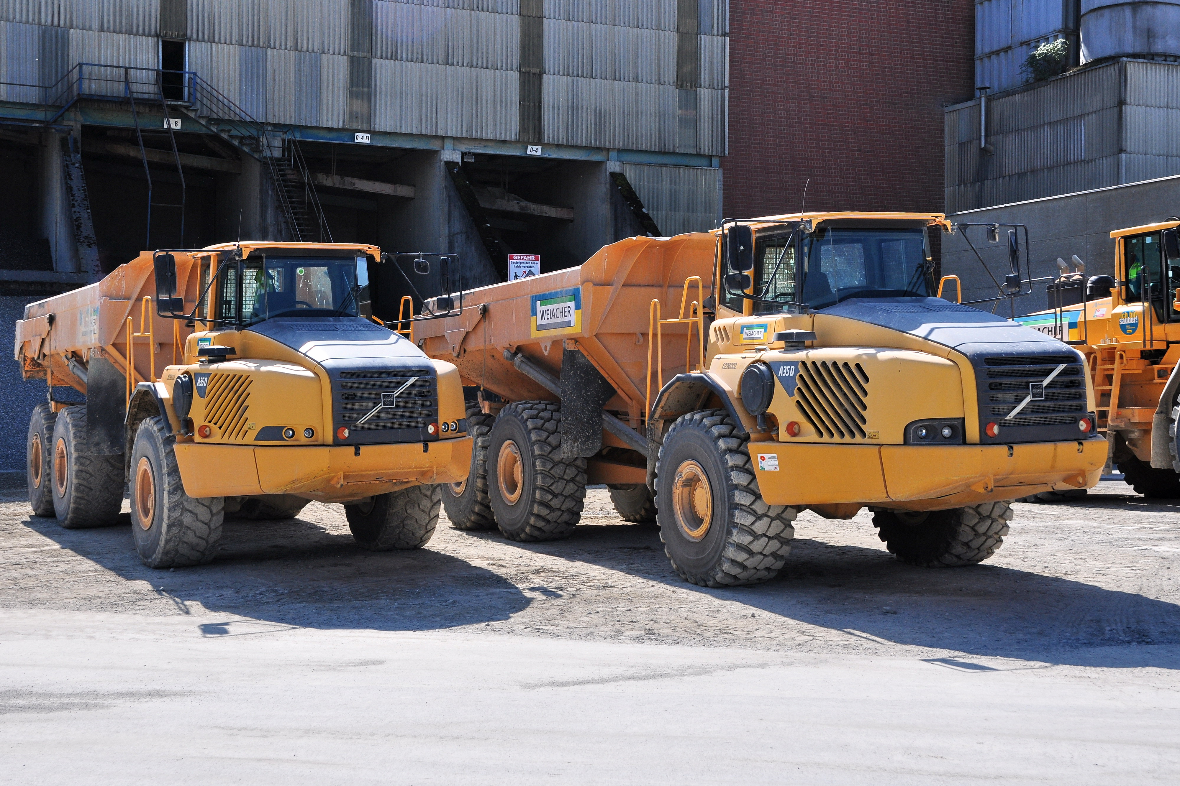 Weiacher Kies AG in Weiach (Switzerland)